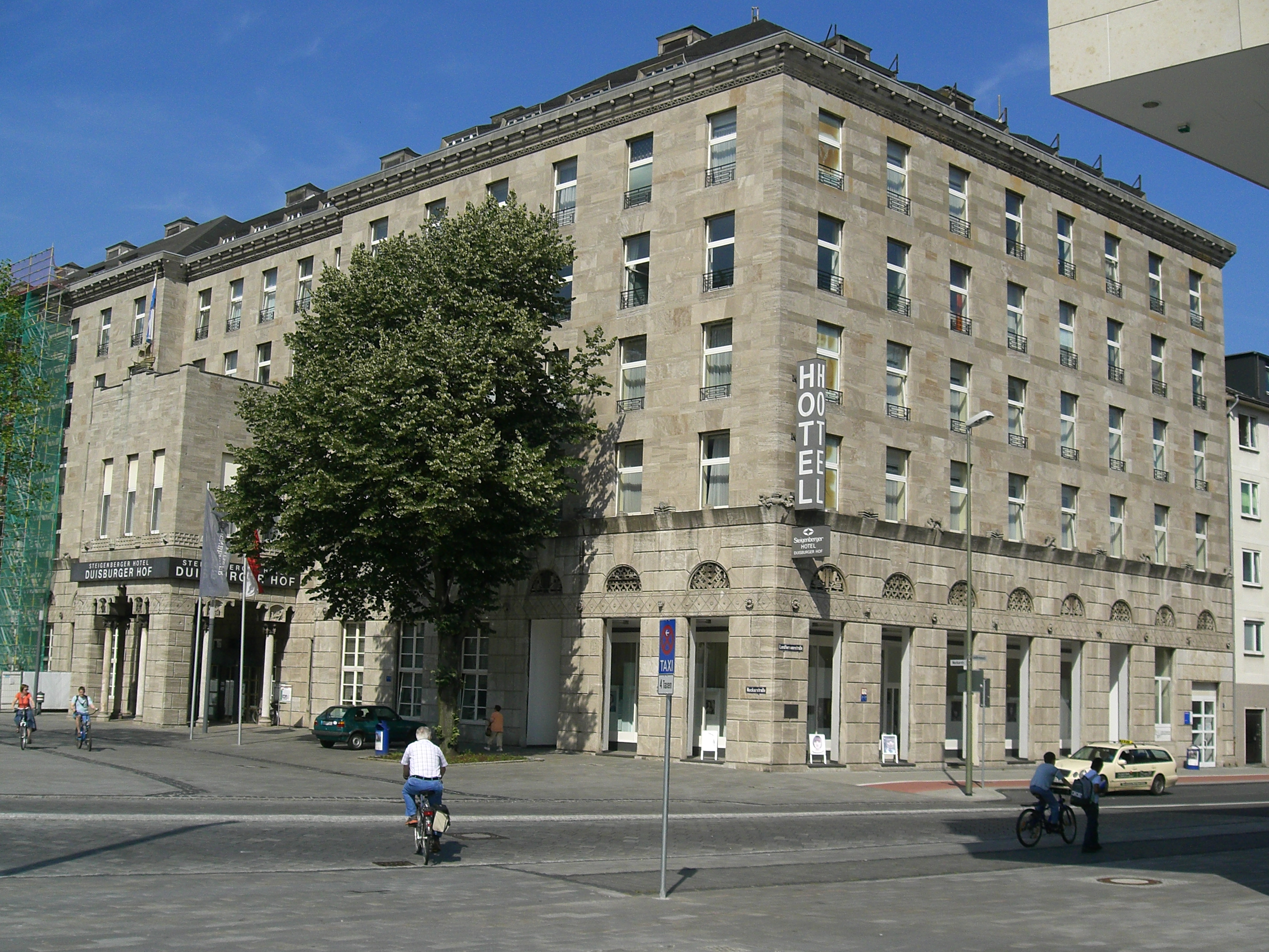 Hotel Duisburger Hof